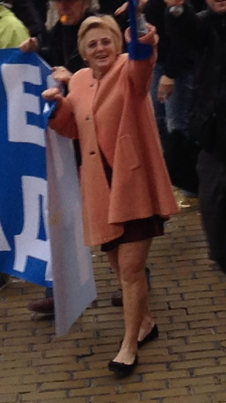 Юлия Берберян